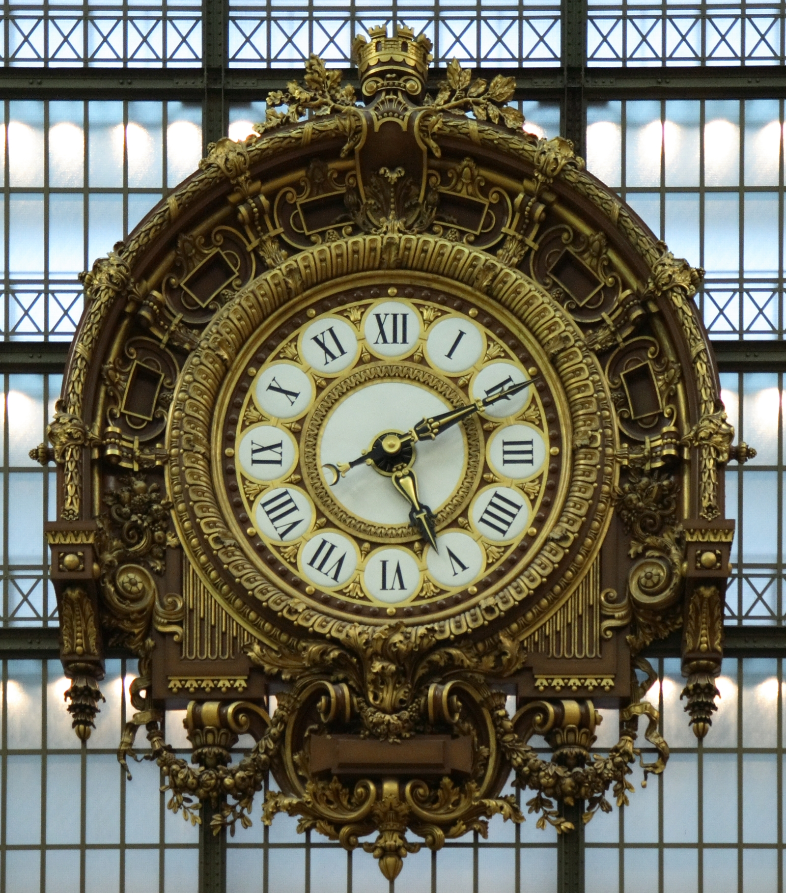 Horloge monumentale de gare. Grande Horloge intérieure de l'ancienne Gare d'Orsay, Musée d'Orsay, VIIe arrondissement, Paris, France.